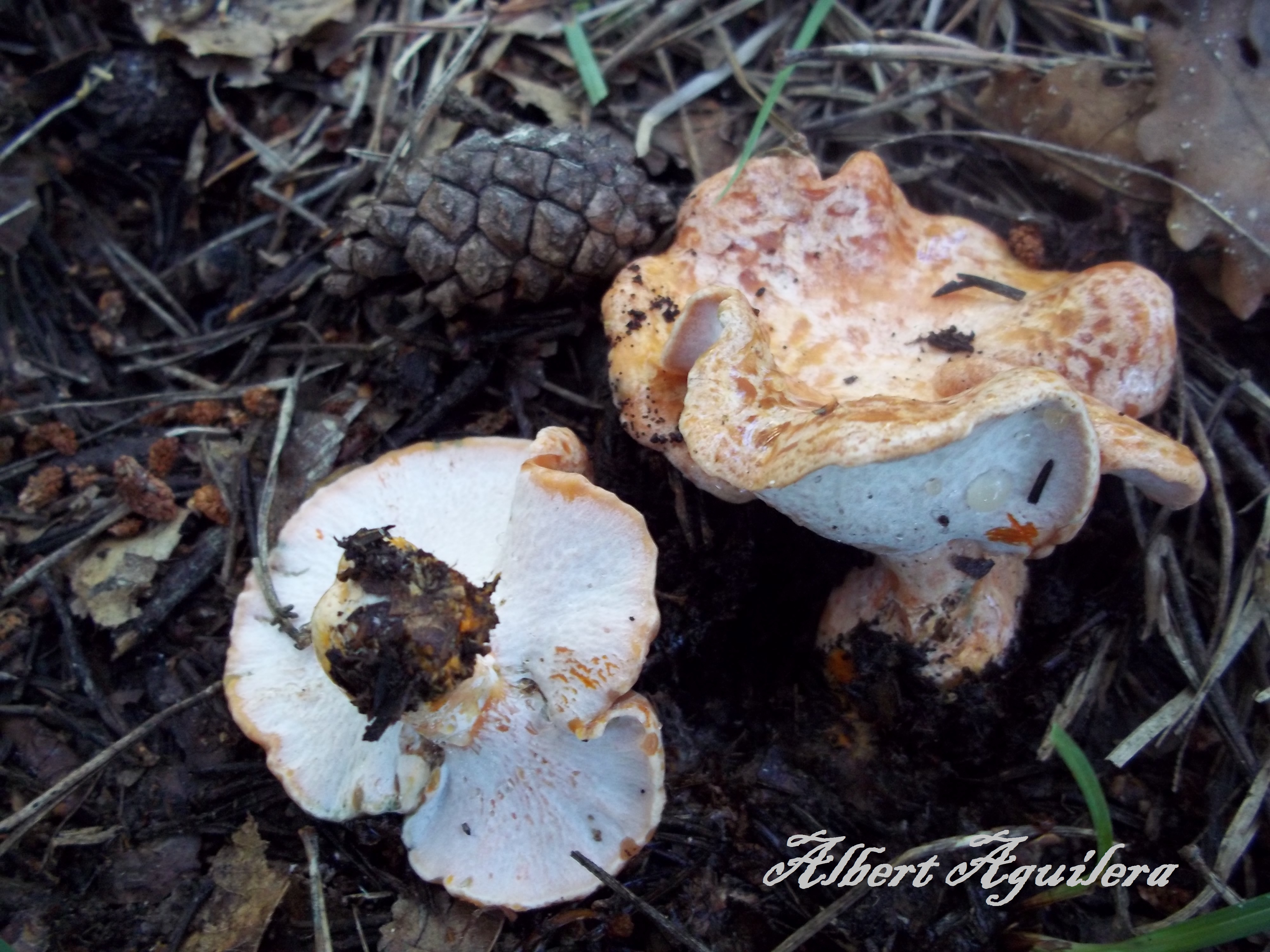 Mare del rovelló